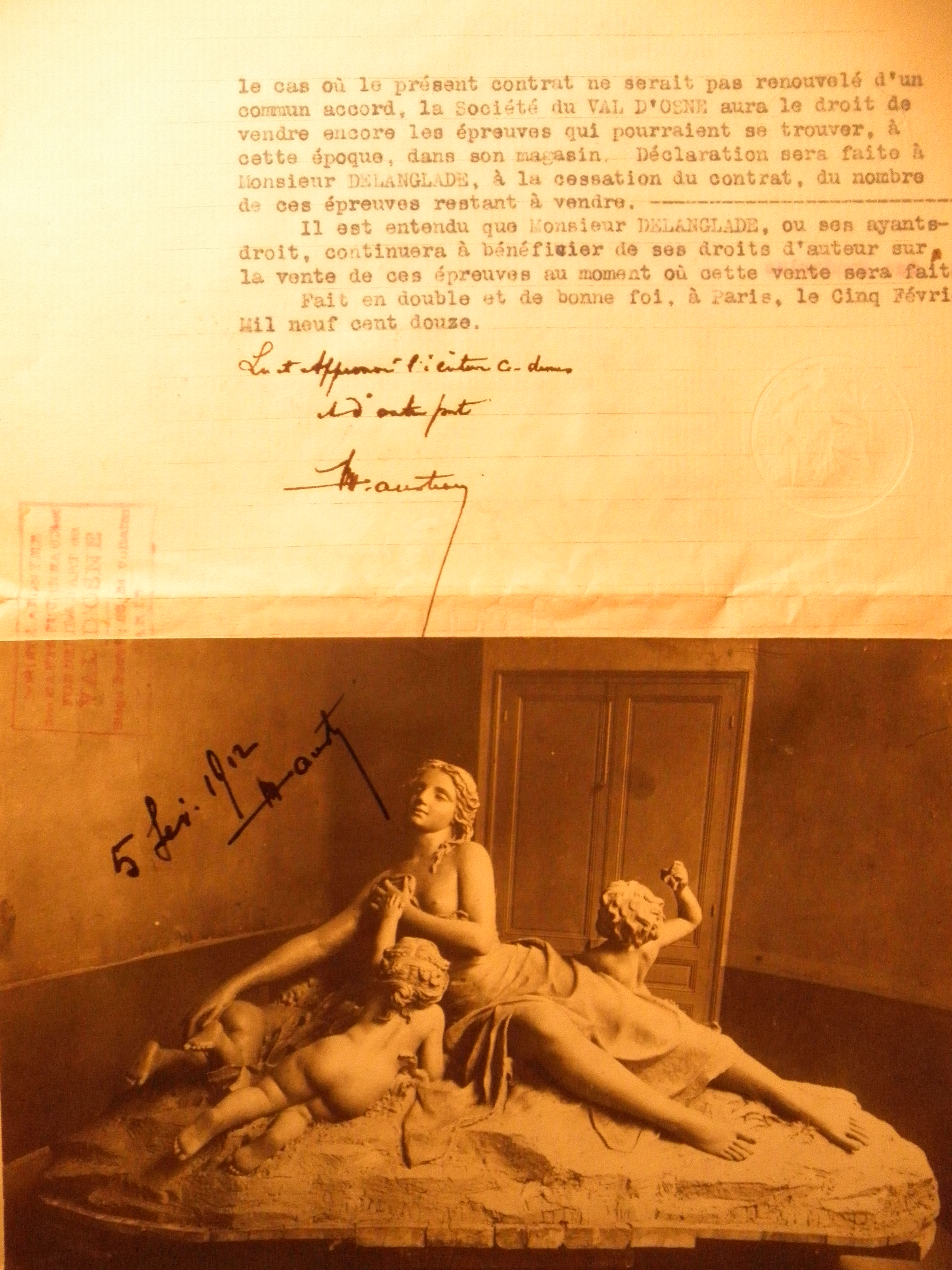 1910 contrat Bonnasse Val d'Osne